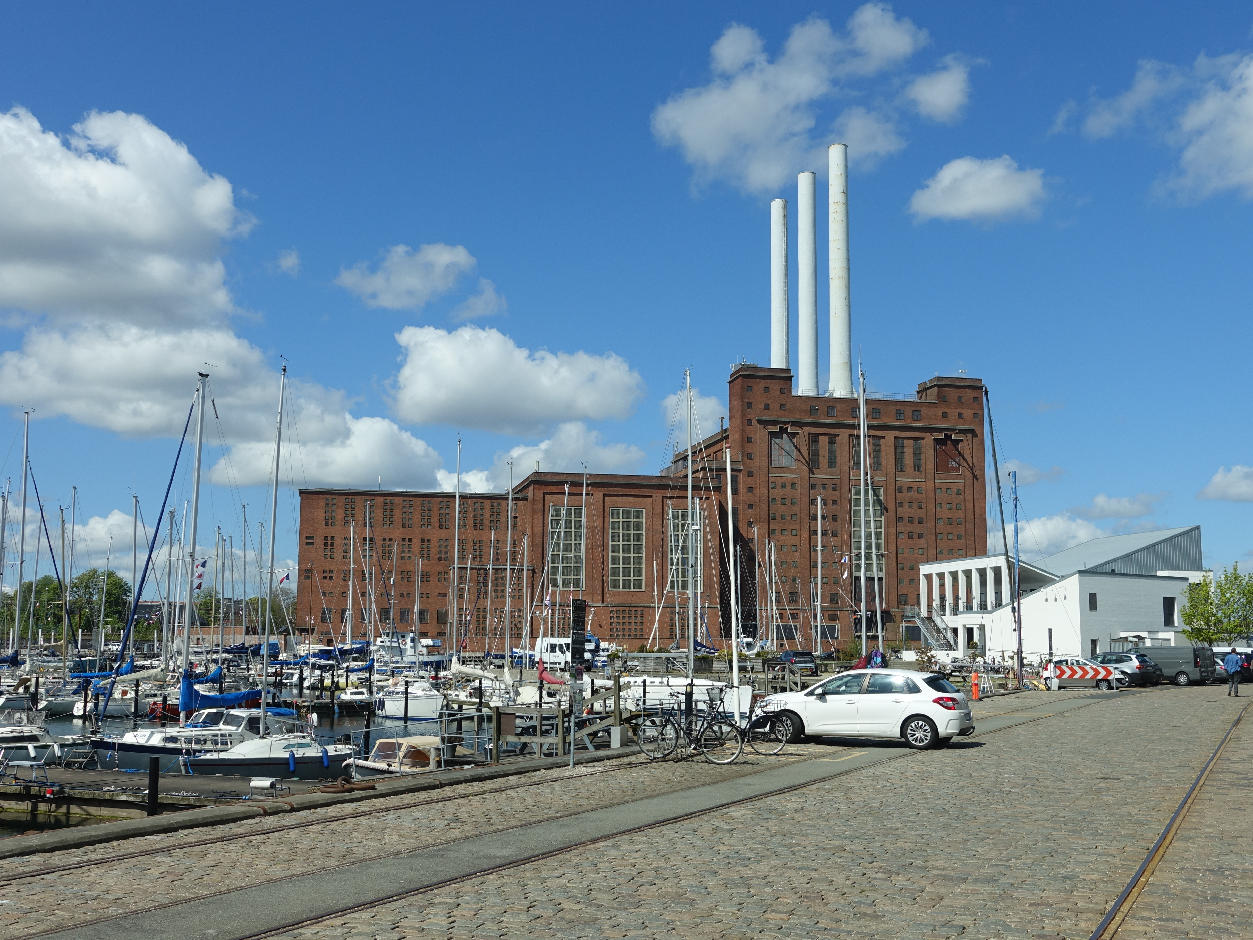 Svanemølleværket / Svanemølle Power Station